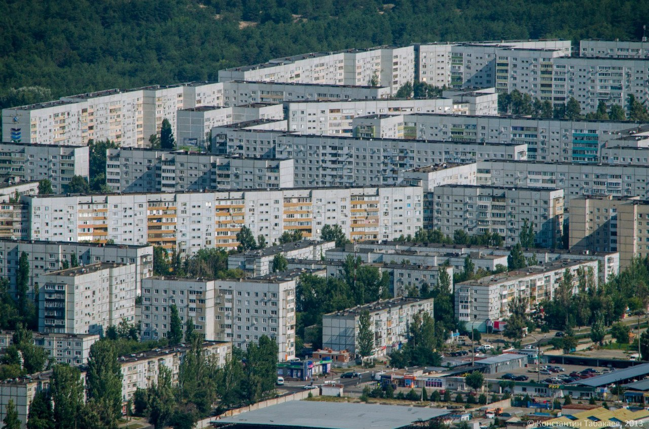 Энергодар с высоты птичьего полета